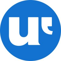 logo actual radio uruguay